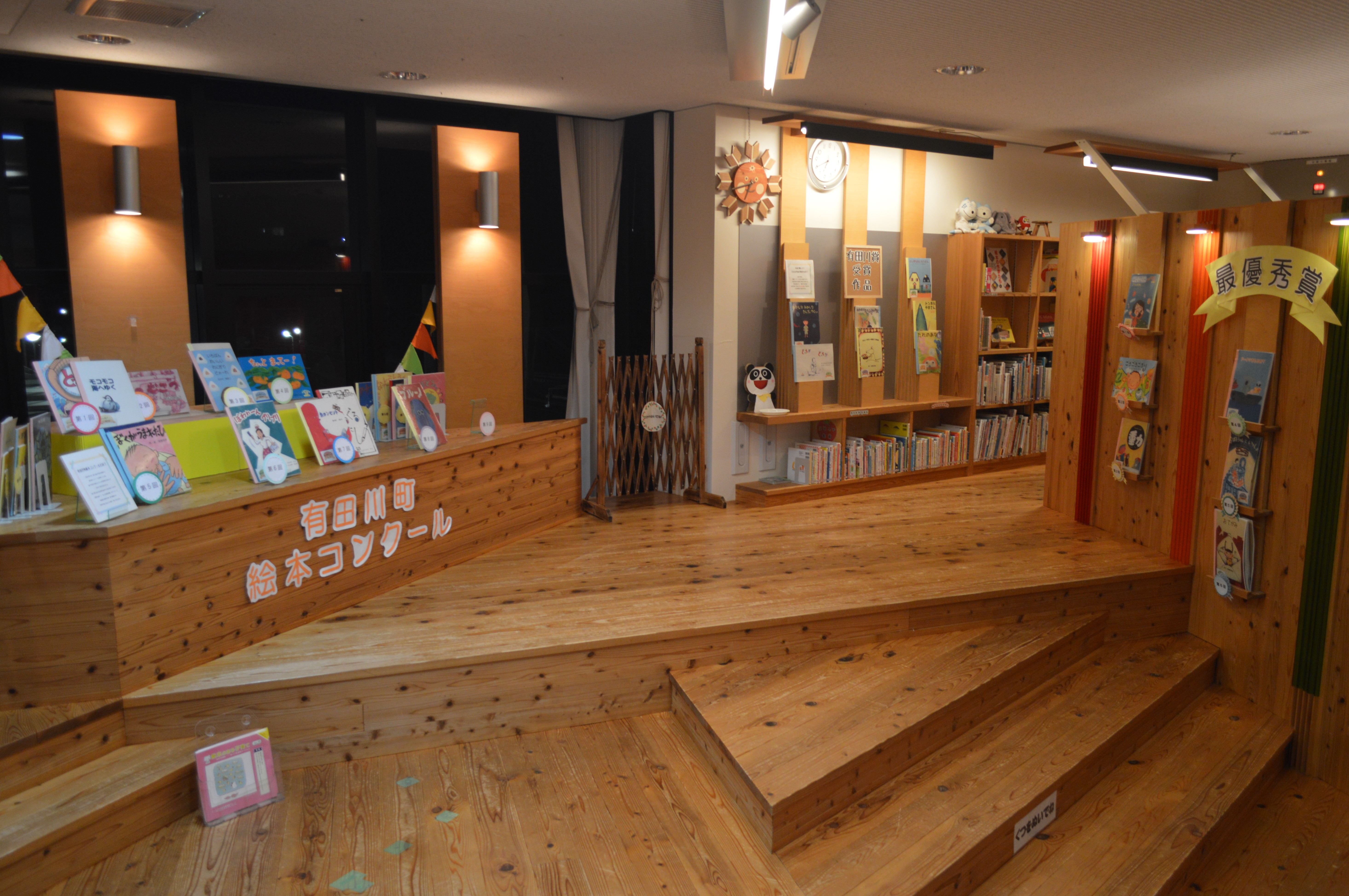 和歌山県有田郡有田川町にあるちいさな駅美術館「Ponte del Sogno」（ポンテ・デル・ソーニョ）。有田川ライブラリーを構成する。